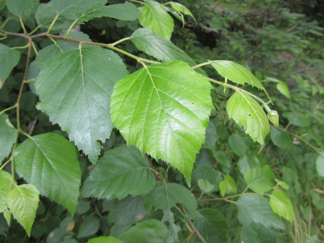 betulapa pyrifera